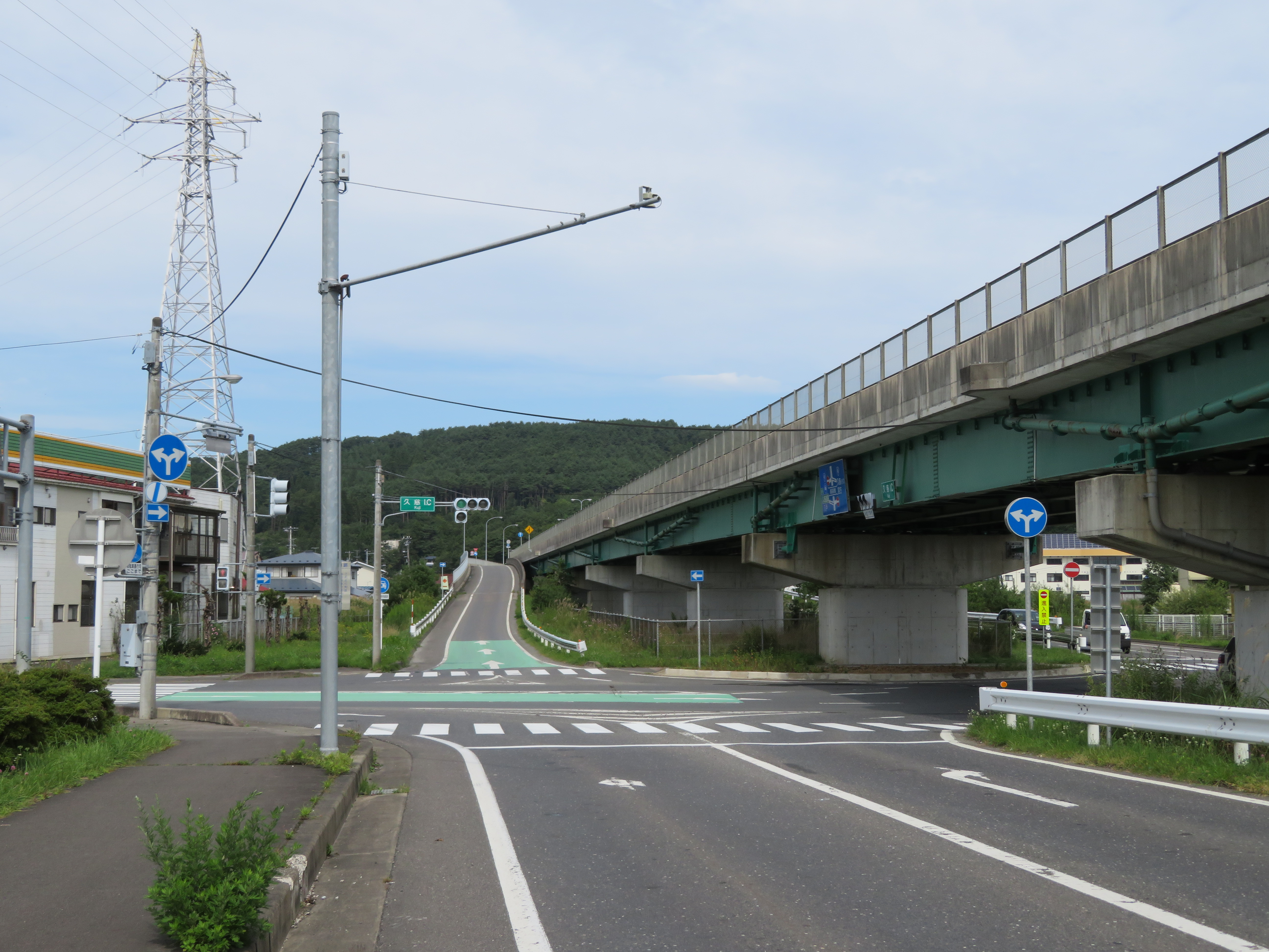 三陸北縦貫道路八戸久慈自動車道久慈インター交差点付近（久慈大橋側から撮影） Canon PowerShot SX720 HS